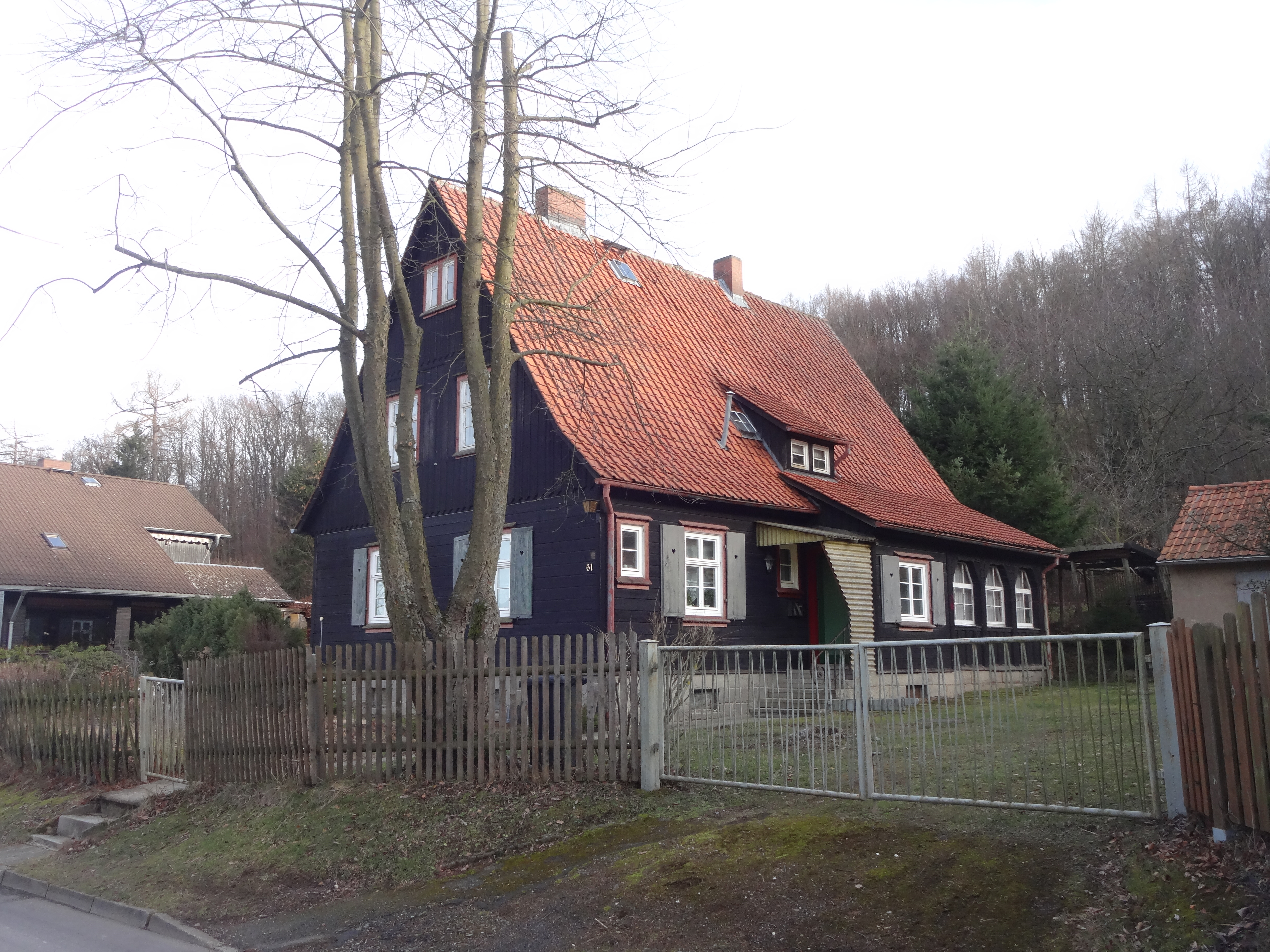 ehemals denkmalgeschütztes Forsthaus in der Rosa-Luxemburg-Straße 61 in Wernigerode